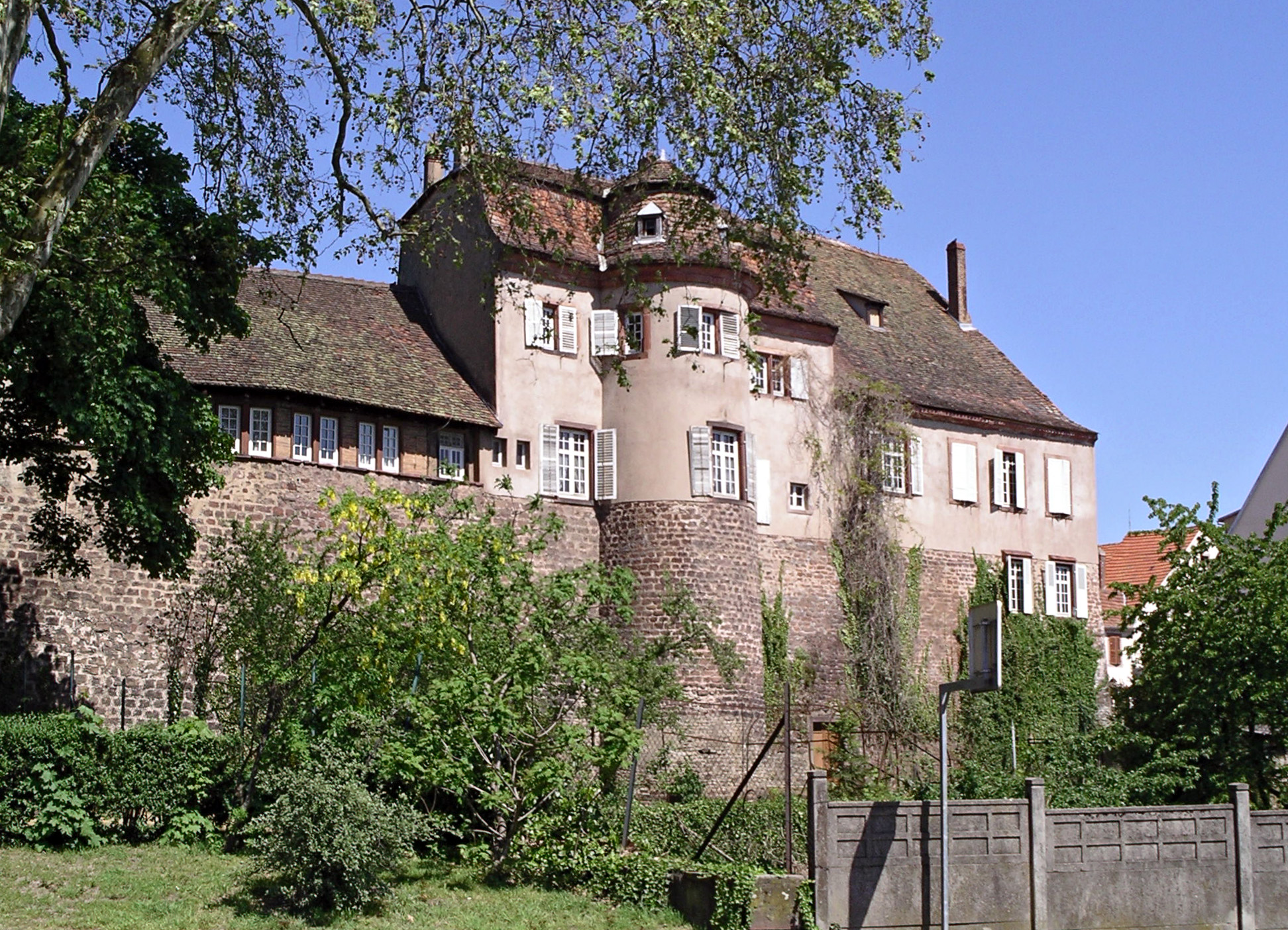 Zabern (Saverne)